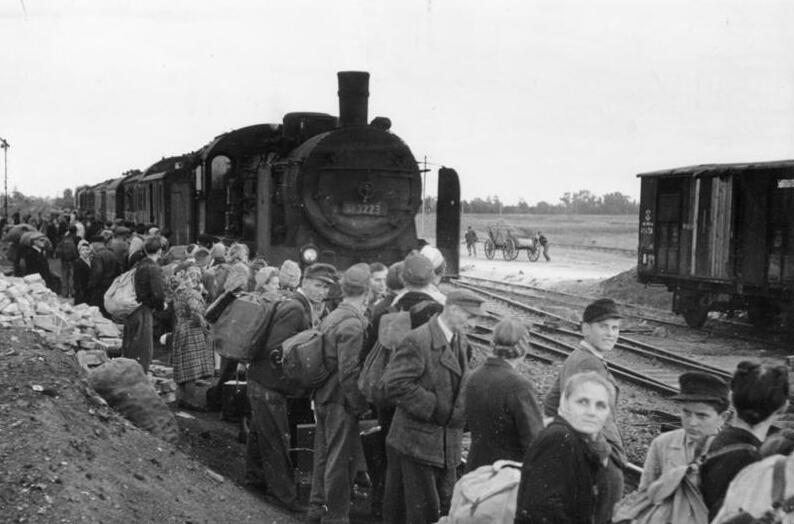 Kartoffelhamsterer im Oderbruch ADN-ZB/ Illus - Heilig Kartoffelhamsterer auf dem Bahnhof Gorgast (Oderbruch/Brandenburg). 5.10.48 2216-48